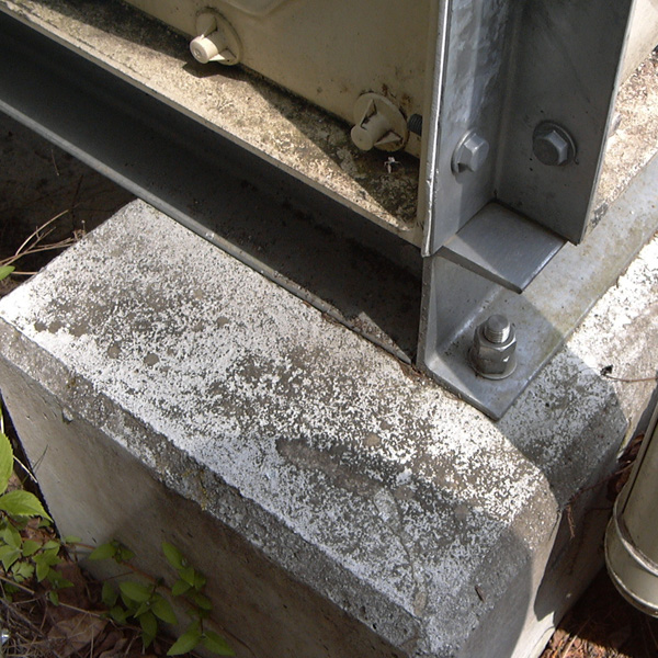 アンカーボルト_設備_01